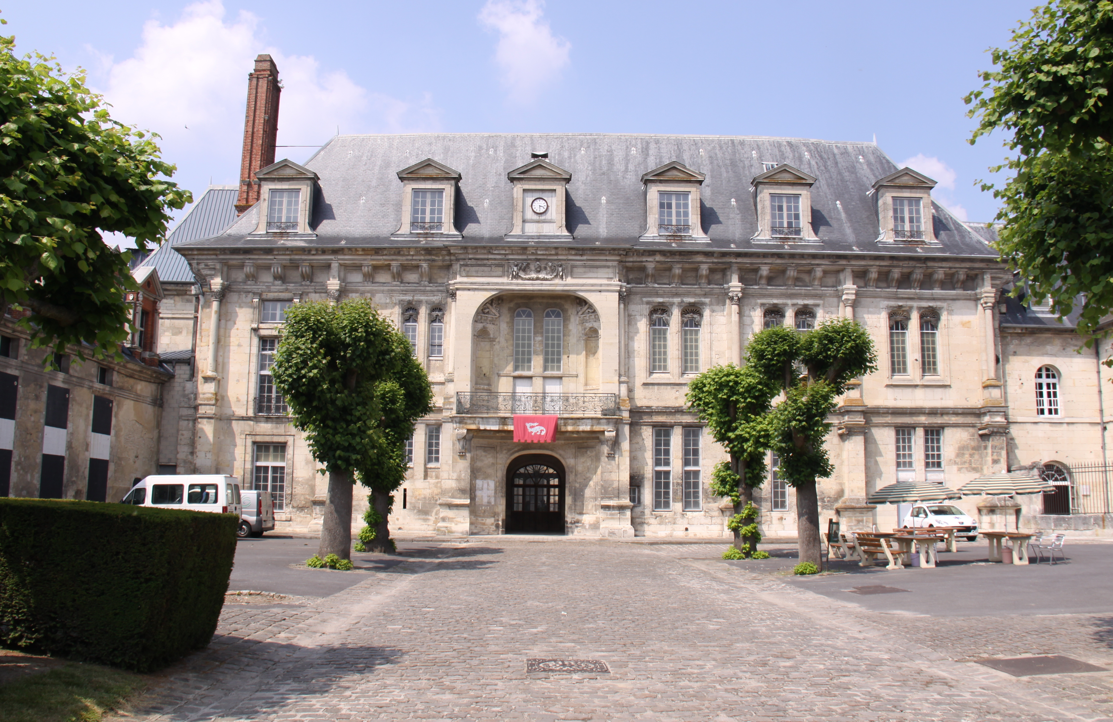 Façade du vieux bâtiment